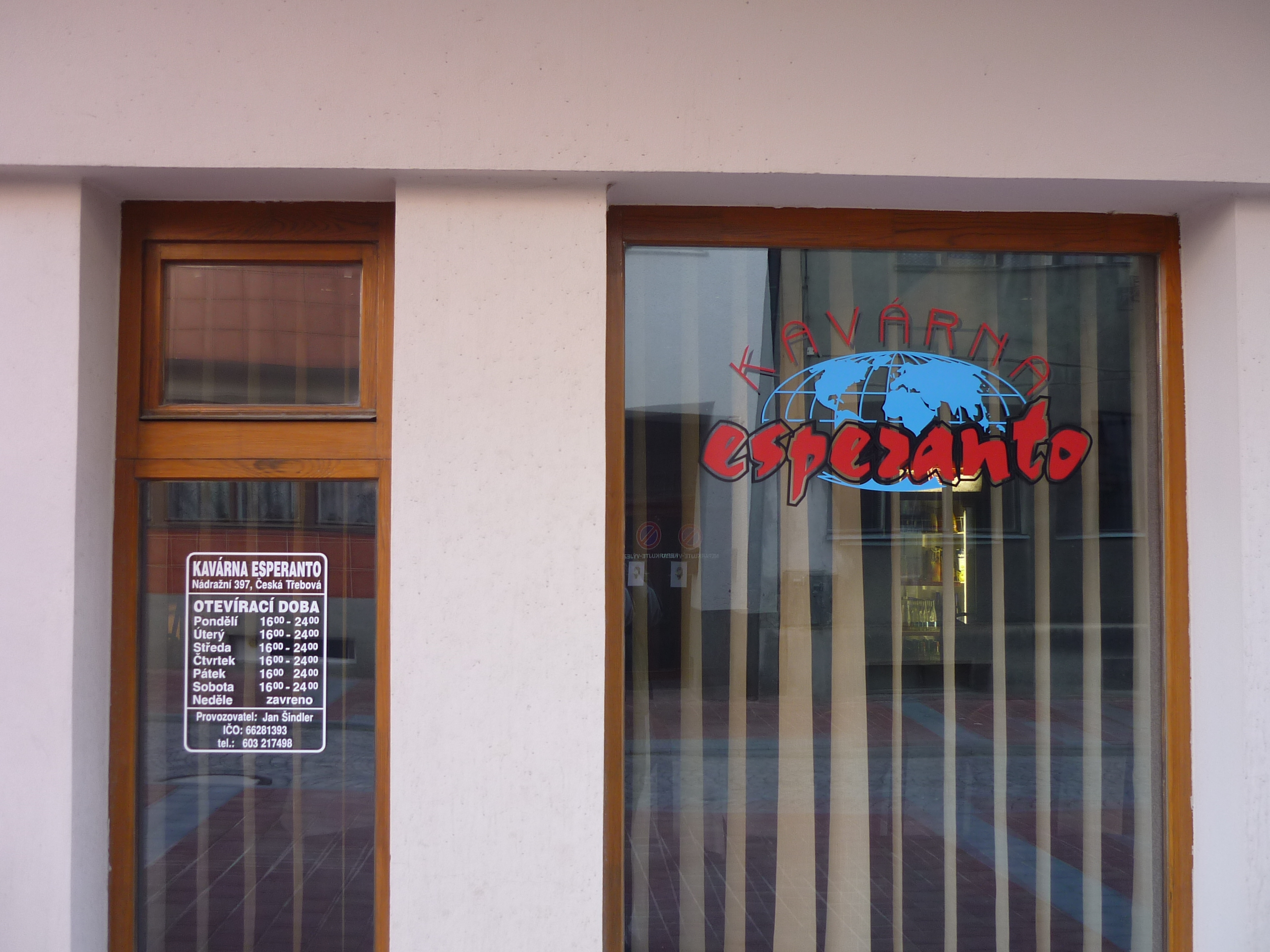 Kávarna Esperanto v České Třebové v ulici Nádražní